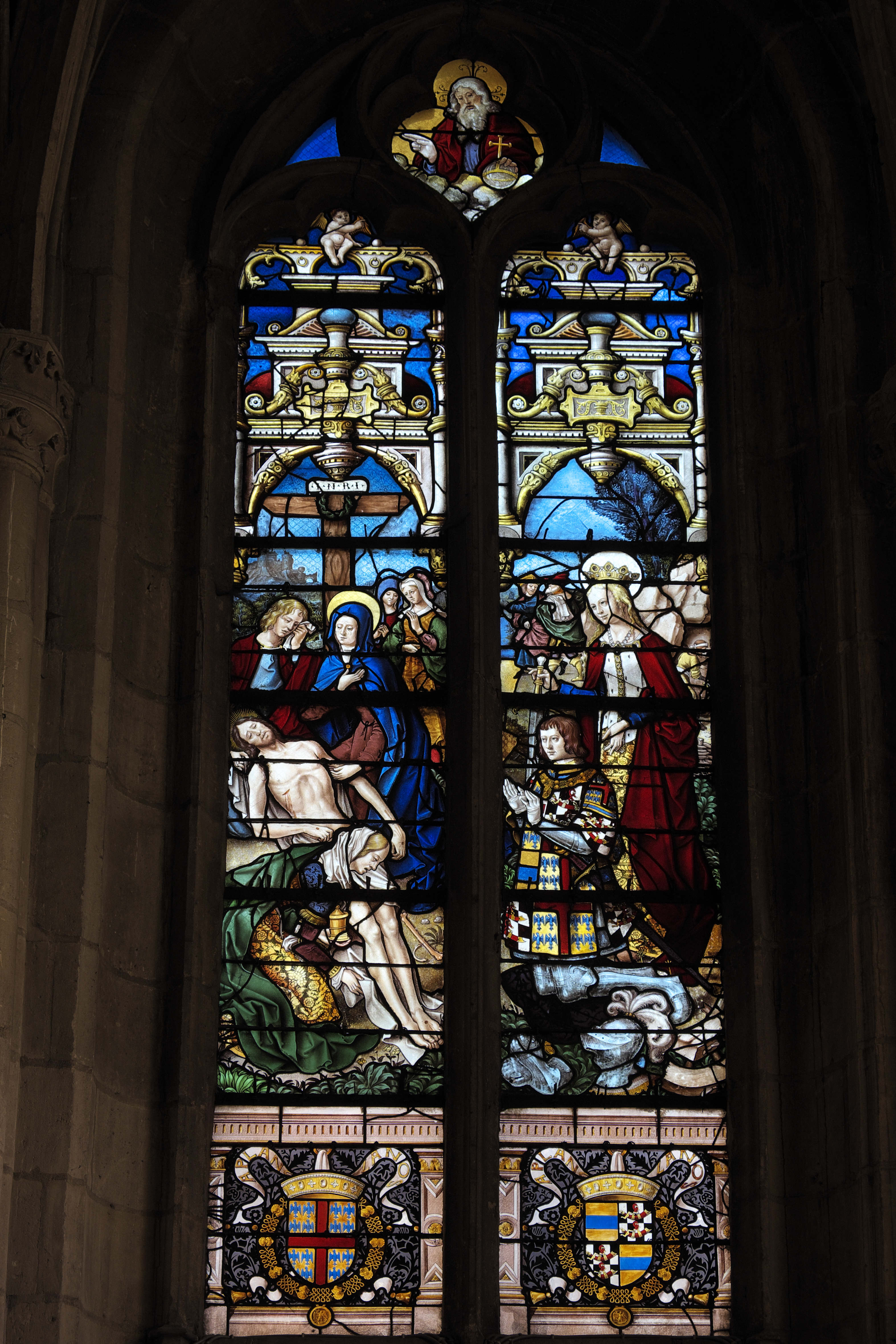 Katholische Pfarrkirche Saint-Martin (Collégiale Saint-Martin) in Montmorency, Bleiglasfenster aus dem 16. Jahrhundert, Darstellung: François de la Rochepot (rechts) und Beweinung Christi (links), im Maßwerk Gottvater (siehe: Dominique Foussard, Charles Huet, Mathieu Lours: Églises du Val-d'Oise. Pays de France, Vallée de Montmorency. Société d'Histoire et d'Archéologie de Gonesse et du Pays de France, 2. Auflage, Gonesse 2011, ISBN 9782953155426)